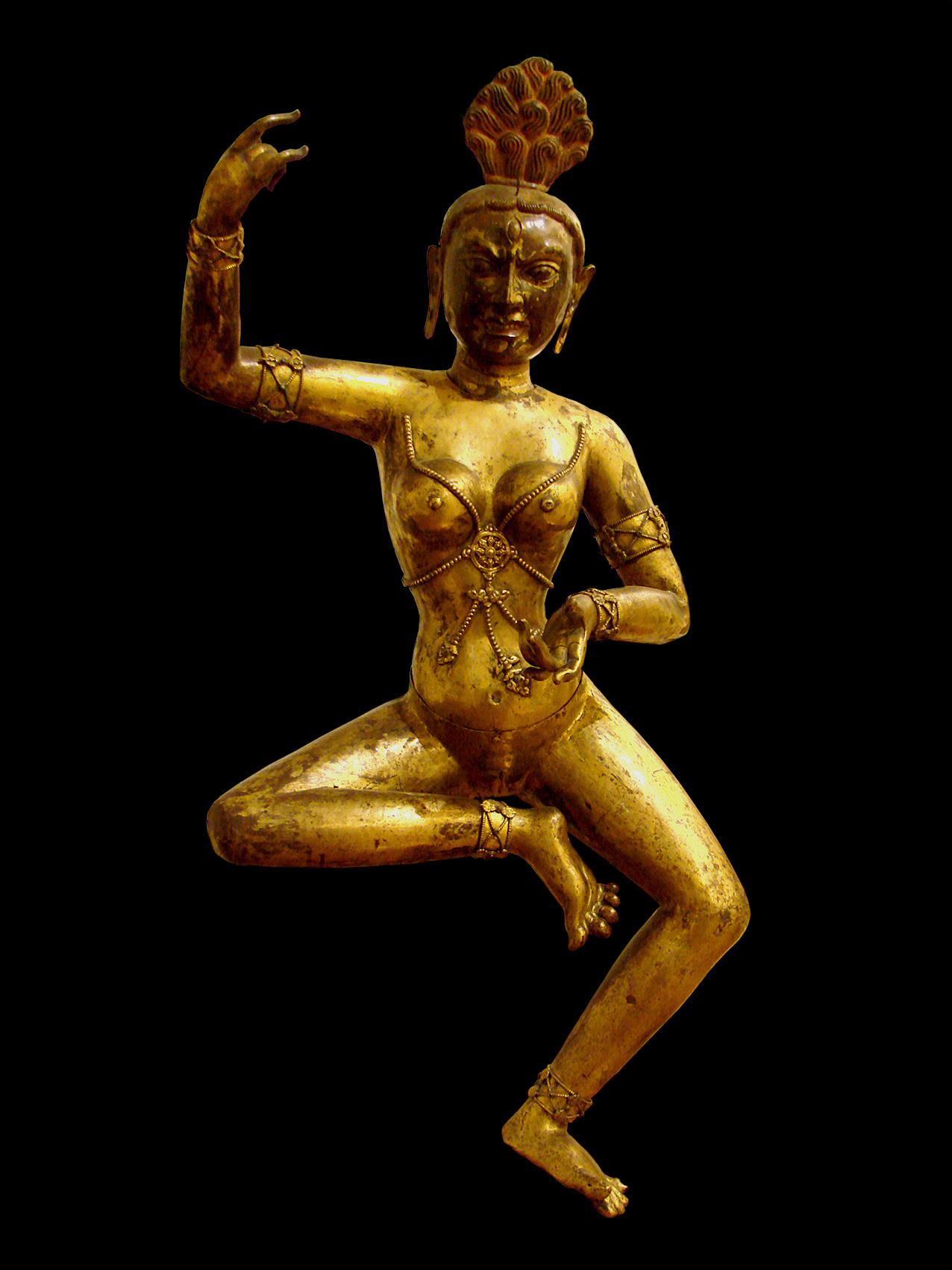 Dakini dansante, cuivre doré avec traces de polychromie, 18ème siècle (?), Tibet. Musée Guimet à Paris.